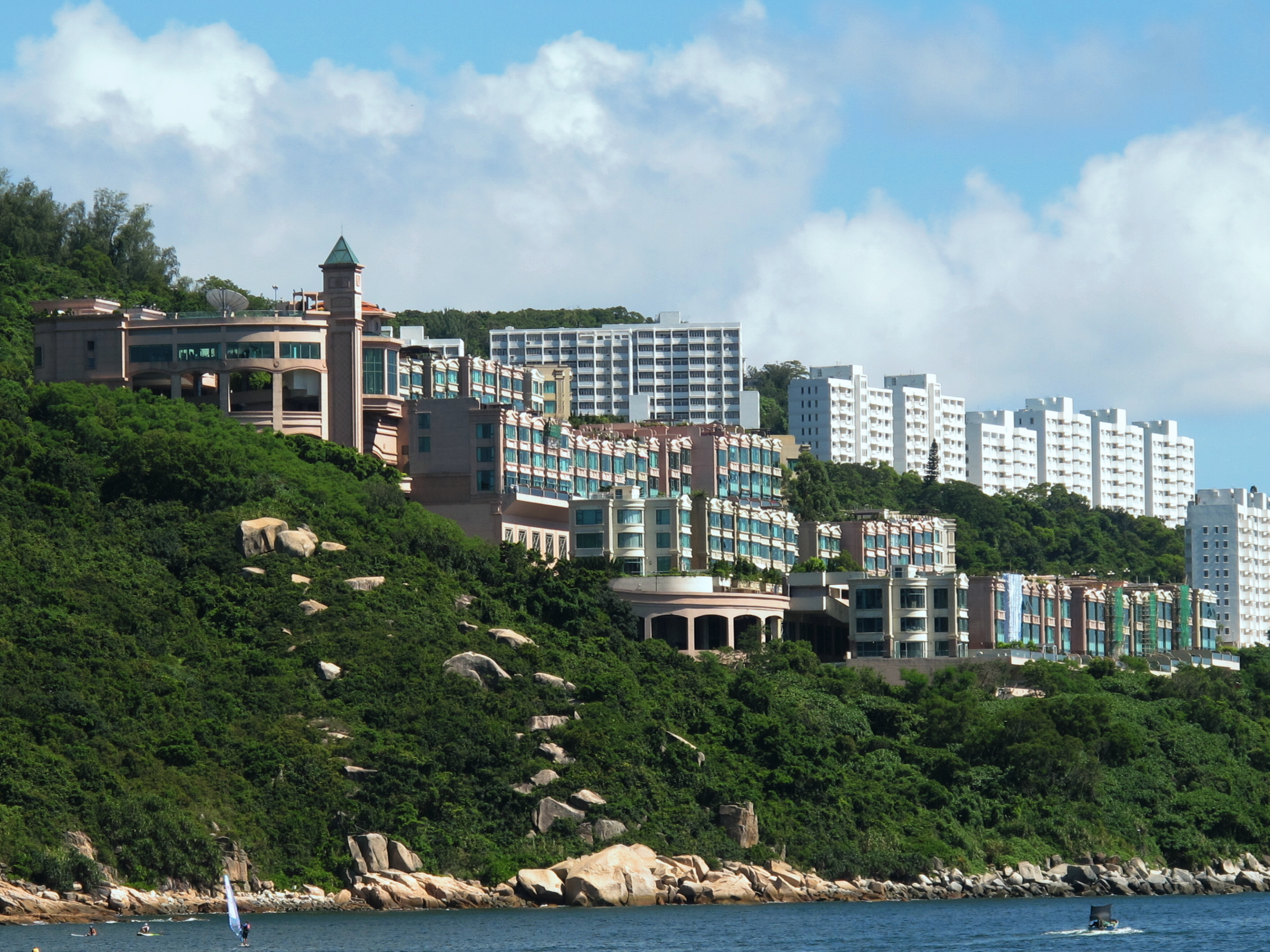 Regalia Bay